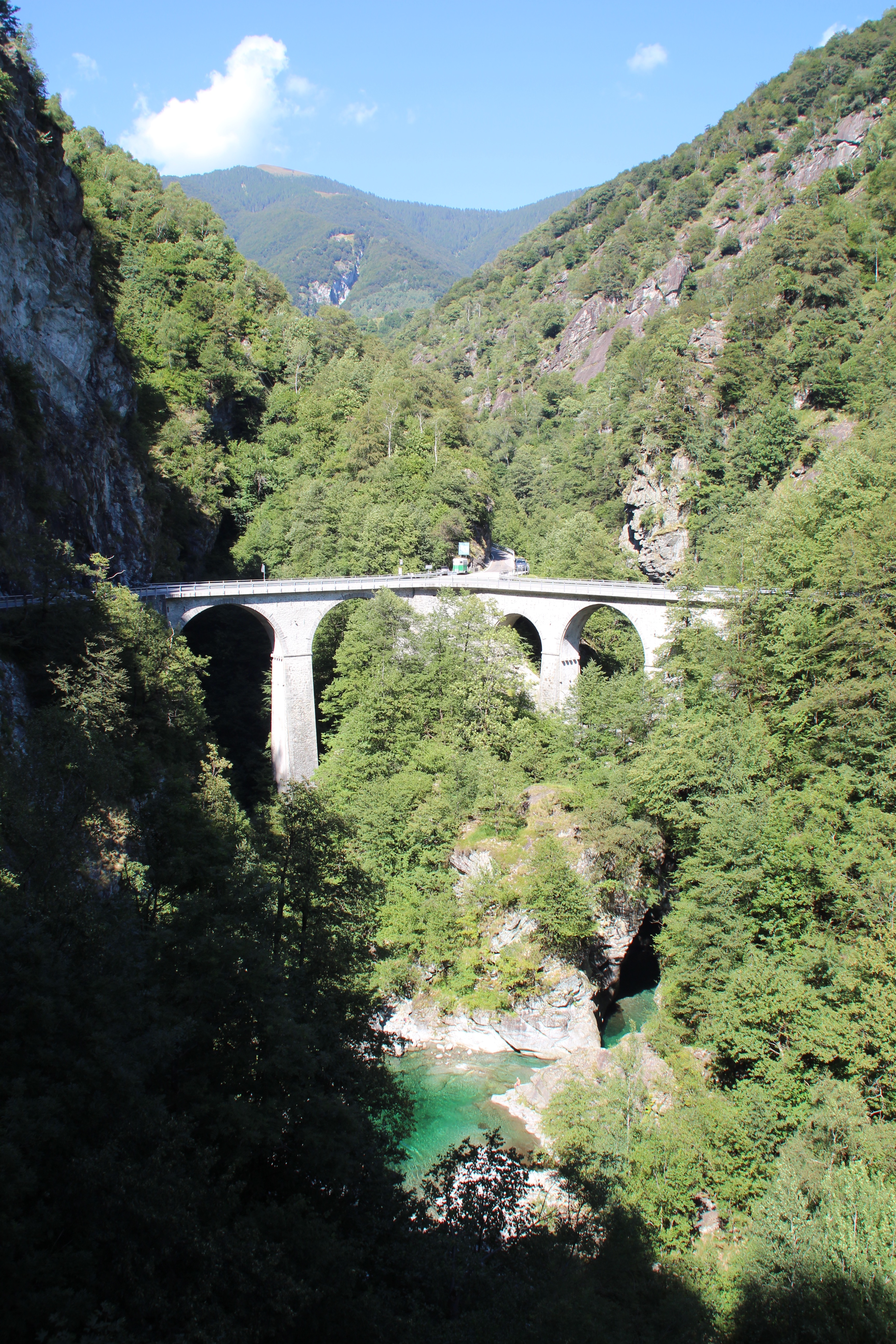 Einmündung des Ribo in den Isorno im Onsernonetal